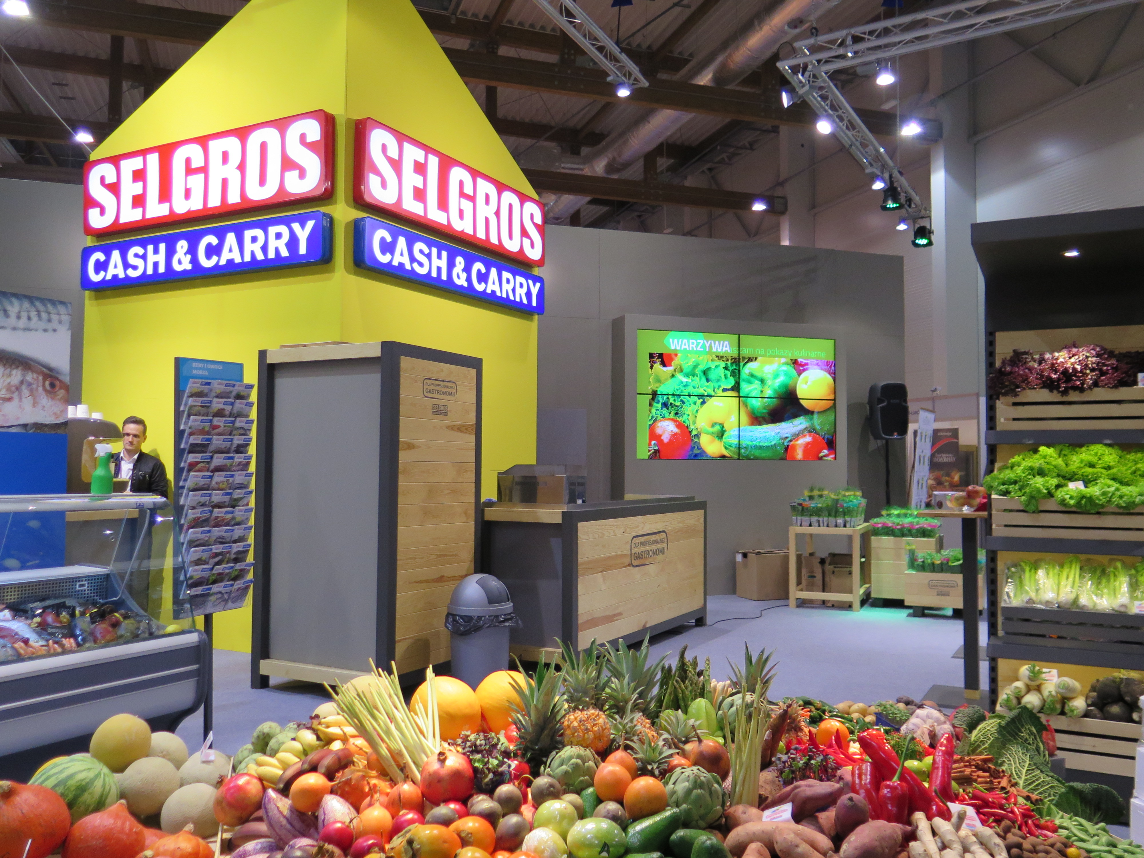 Asortyment spożywczy dla hoteli i restauracji podczas HORECA 2014 w Krakowie